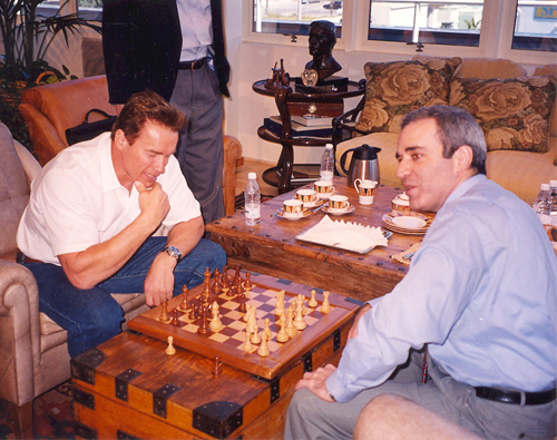 Arnold Schwarzenegger et Garry Kasparov en 2007